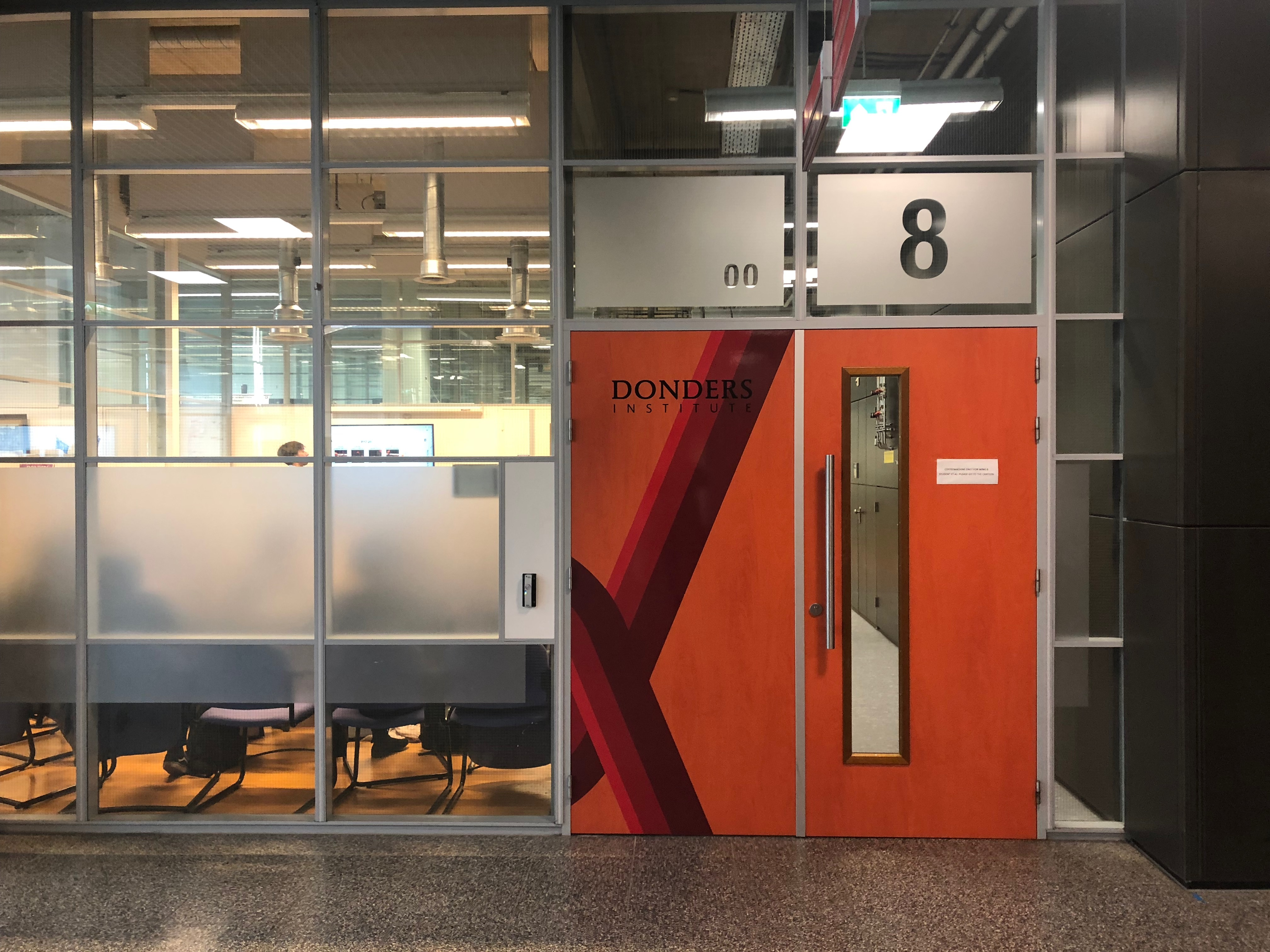 Huygensgebouw in Nijmegen